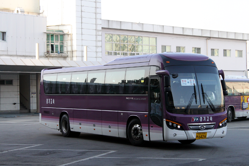 경기고속 소속 FX II 116 정측면